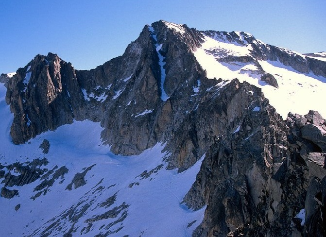 Cresta Maldito - Punta Astorg depuis l'aiguille Juncadella